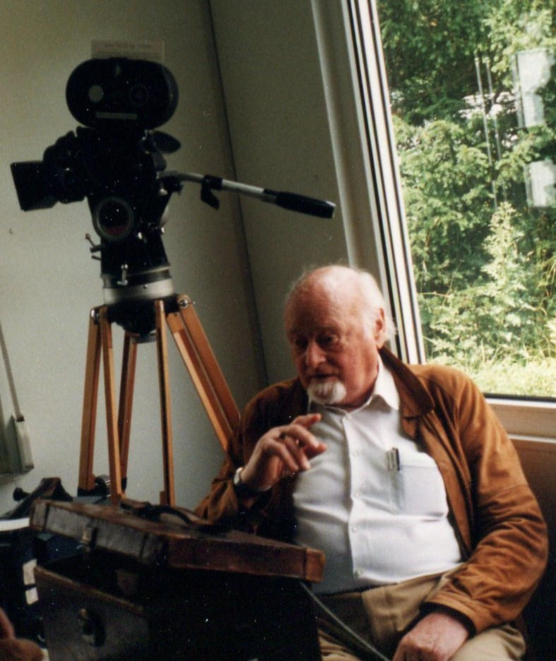 Porträt Jan-Thilo Haux, ehemaliger Chefkameramann des Norddeutschen Rundfunks